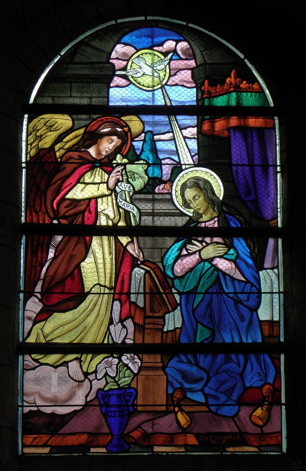 Église Notre-Dame de Rimou (35). Intérieur. Vitrail. Annonciation.